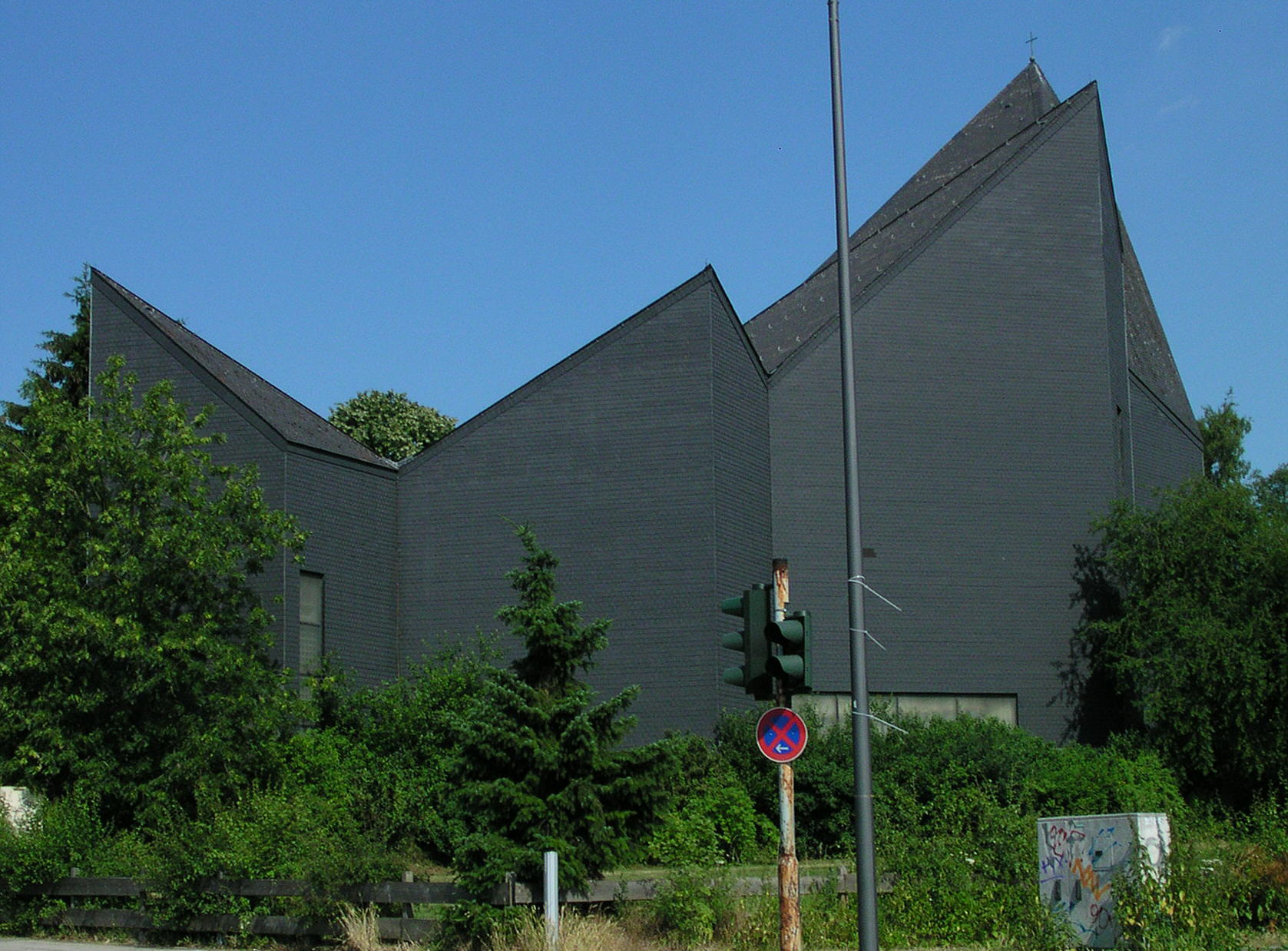 katholische Hubertuskirche in Aachen-Ronheide. Architekt: Gottfried Böhm (1964), Fenster: Ludwig Schaffrath. Wird von der Bevölkerung gern als "Backenzahn" bezeichnet.